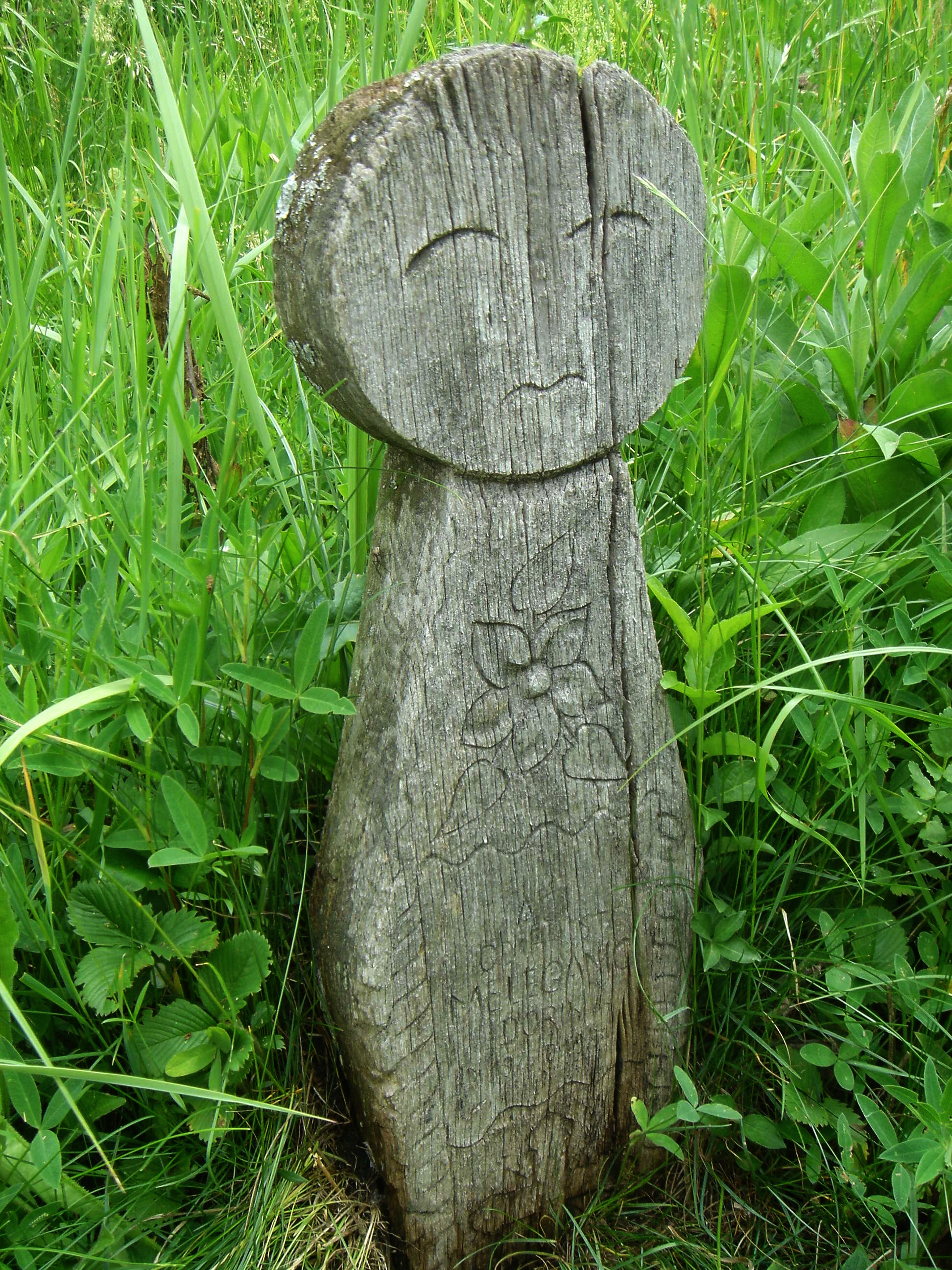 Előpataki roma gyerek sírja (Erdély). Párhuzamait a balkánon találjuk.